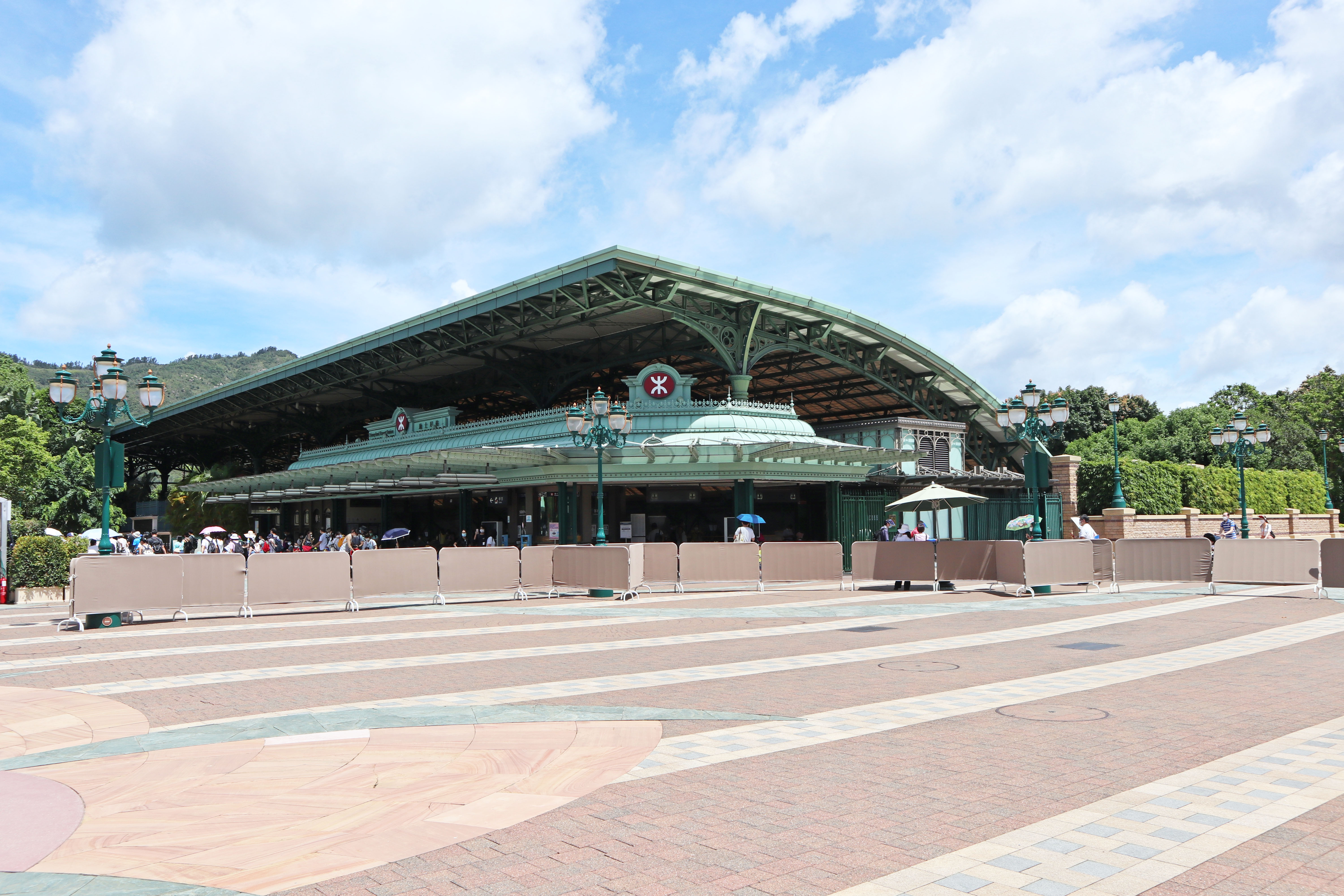 港鐵迪士尼站外觀